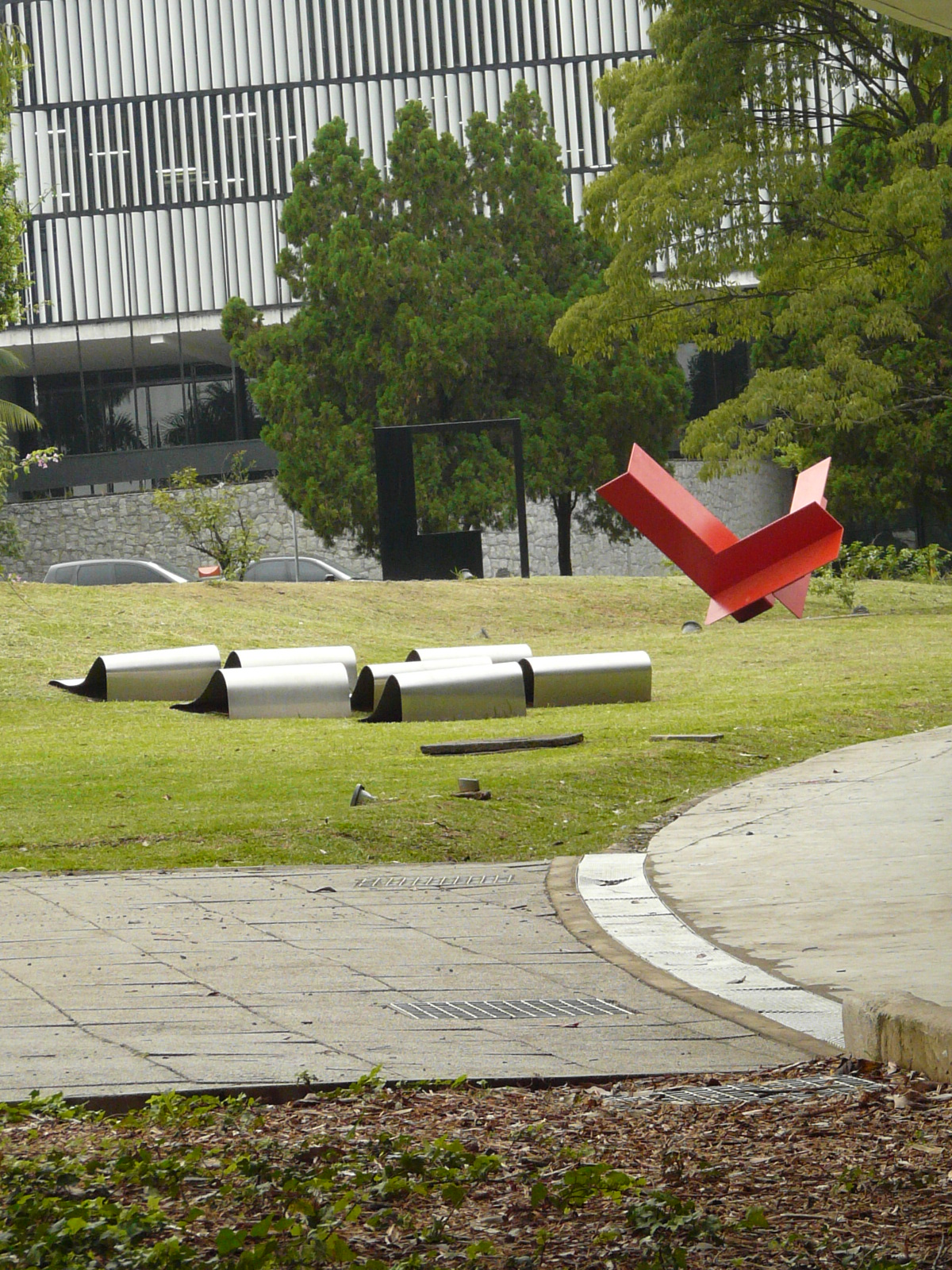 quebra cabeça in São Paulo/Brazil